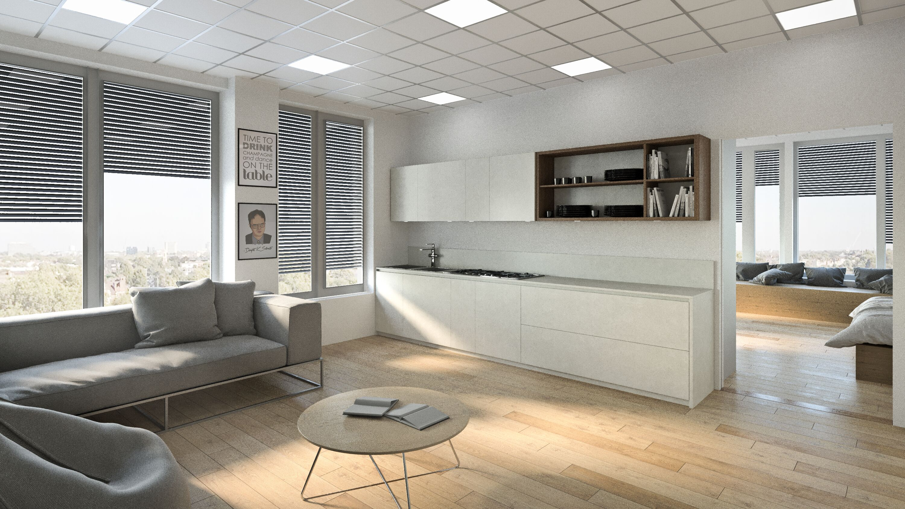 Apartmán Campus VŠEM